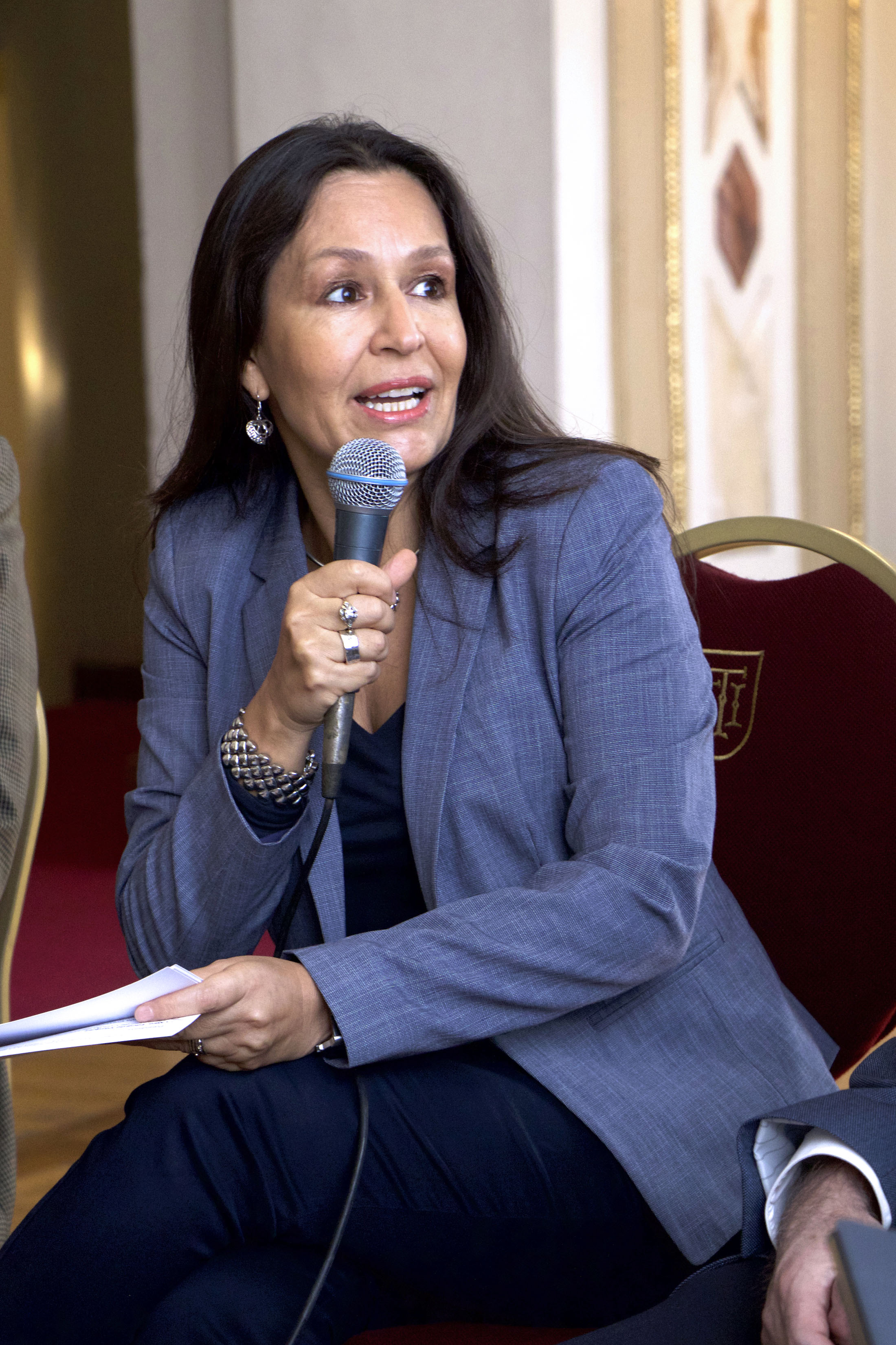 Lunes 15 de octubre de 2018. En el Foyer del Teatro de la Ciudad Esperanza Iris, Lidia Camacho, directora general del Instituto Nacional de Bellas Artes (INBA); Antonio Crestani, director general de Vinculación Cultural de la Secretaría de Cultura Federal; Luisa Huertas, miembro de la Dirección Artística de la 39 Muestra Nacional de Teatro; Ángel Ancona, coordinador del Sistema de Teatros de la CDMX; Alberto Lomnitz, coordinador nacional de Teatro del INBA; Sonia Couch, representante de la libre y Luz Emilia Aguilar Zinser, crítica de teatro, ofrecieron una conferencia de prensa para anunciar la 39 Muestra internacional de Teatro. Fotografía: Milton Martínez / Secretaría de Cultura CDMX.